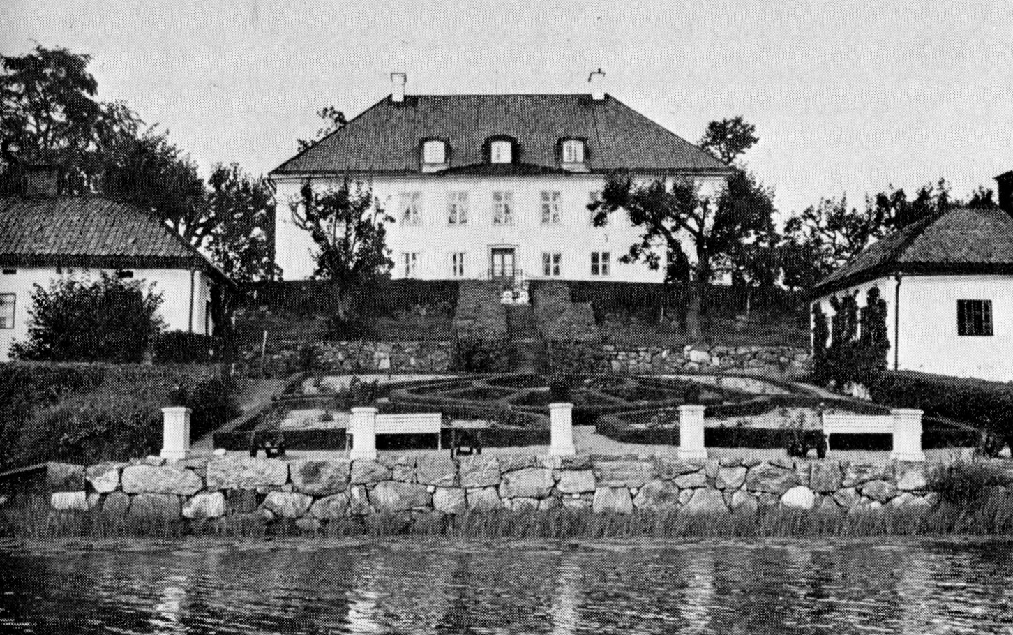 Herresta från sjösidan